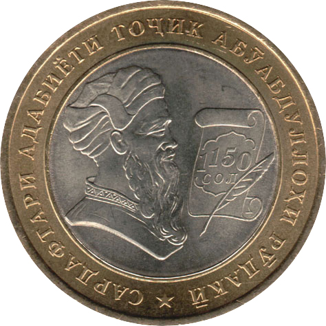 Памятная монета Таджикистана 2008 года, посвященная 1150-летию Абу Абдаллаха Рудаки - 5 сомони - биметалл